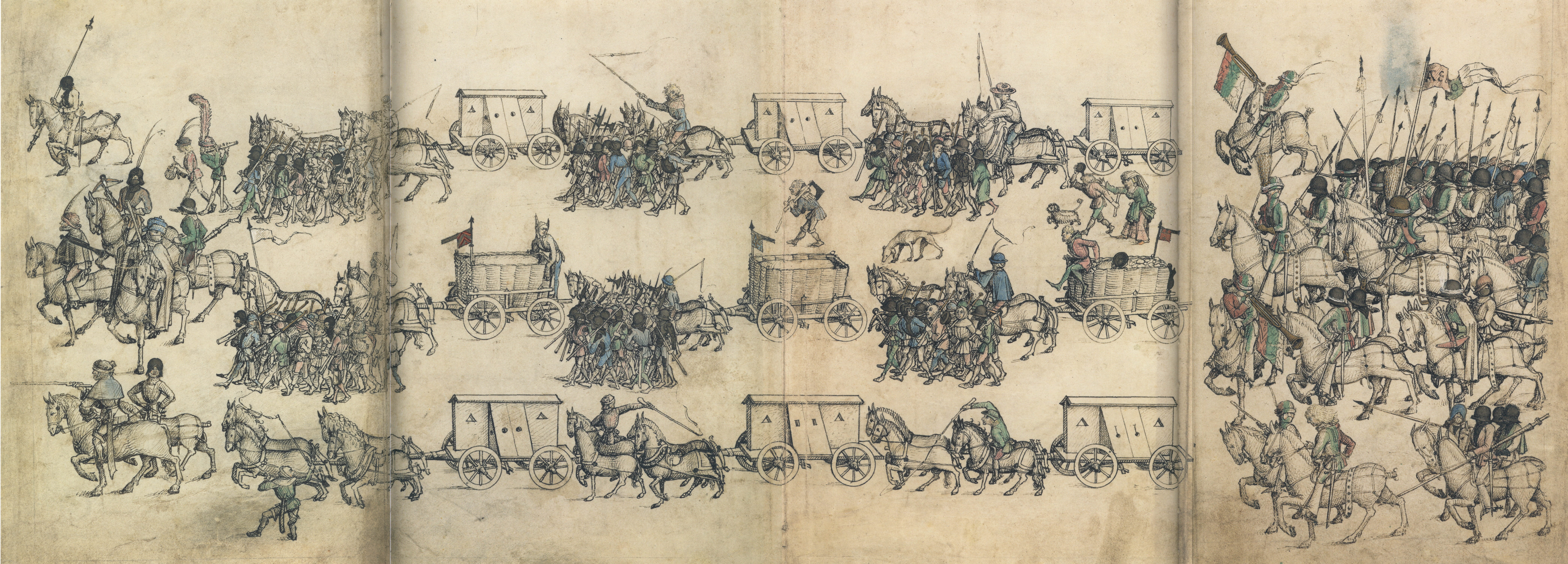 Mittelalterliches Hausbuch von Schloss Wolfegg Ausklappbare Darstellung, fol. 51v–52r1: Mittelalterlicher Heerzug